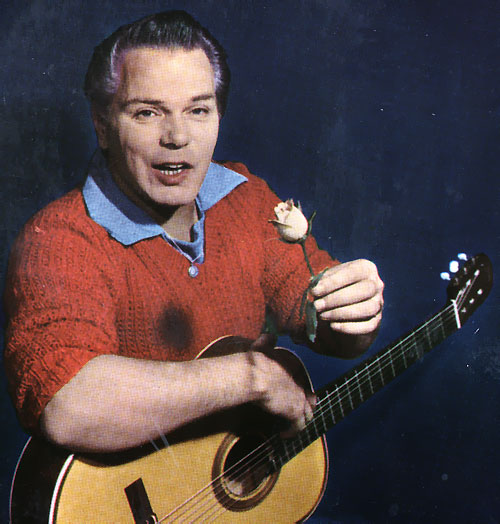 Anders Börje